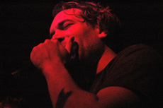 Zanger van Yukka (Foto genomen in Willemeen in Arnhem 16 december nl:2005)